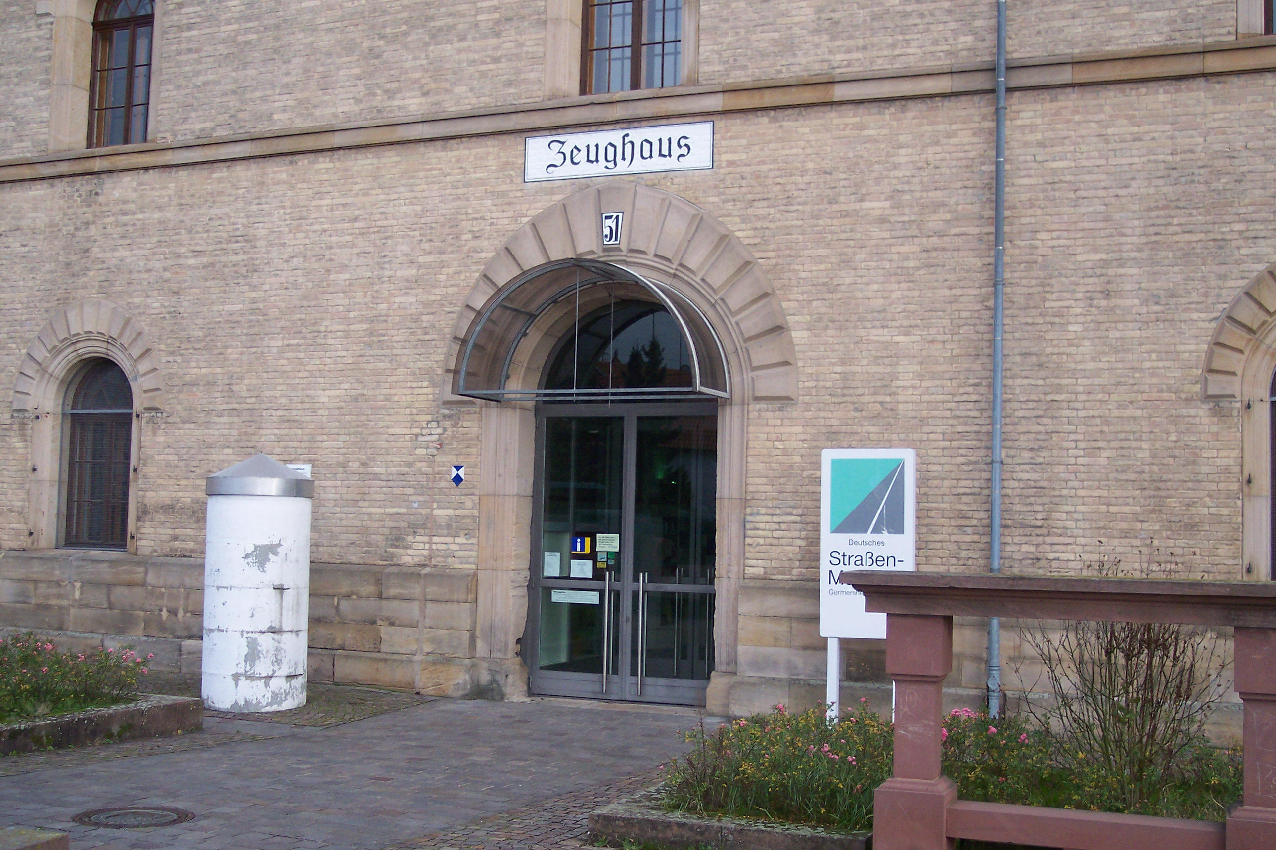 Das ehemalige Zeughaus, heute Deutsches Straßenmuseum.